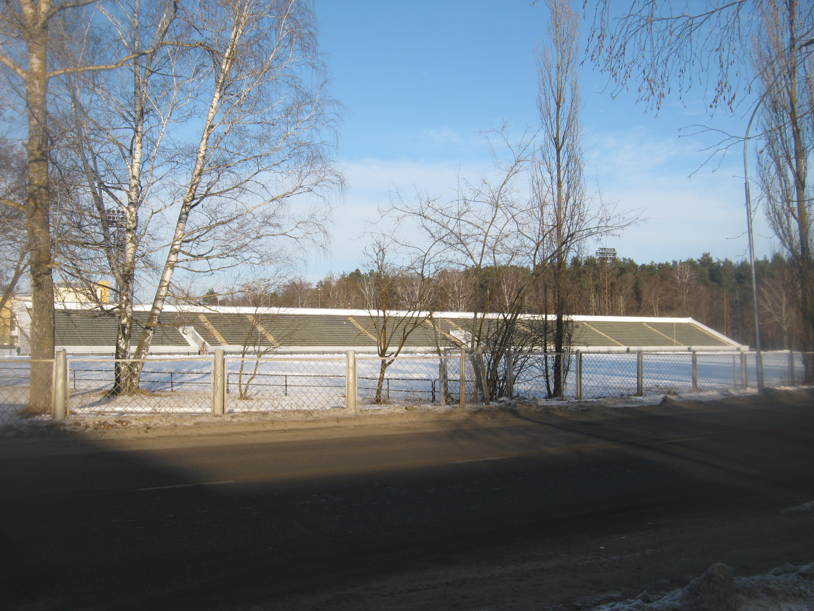 Стадион на Коммунальной улице